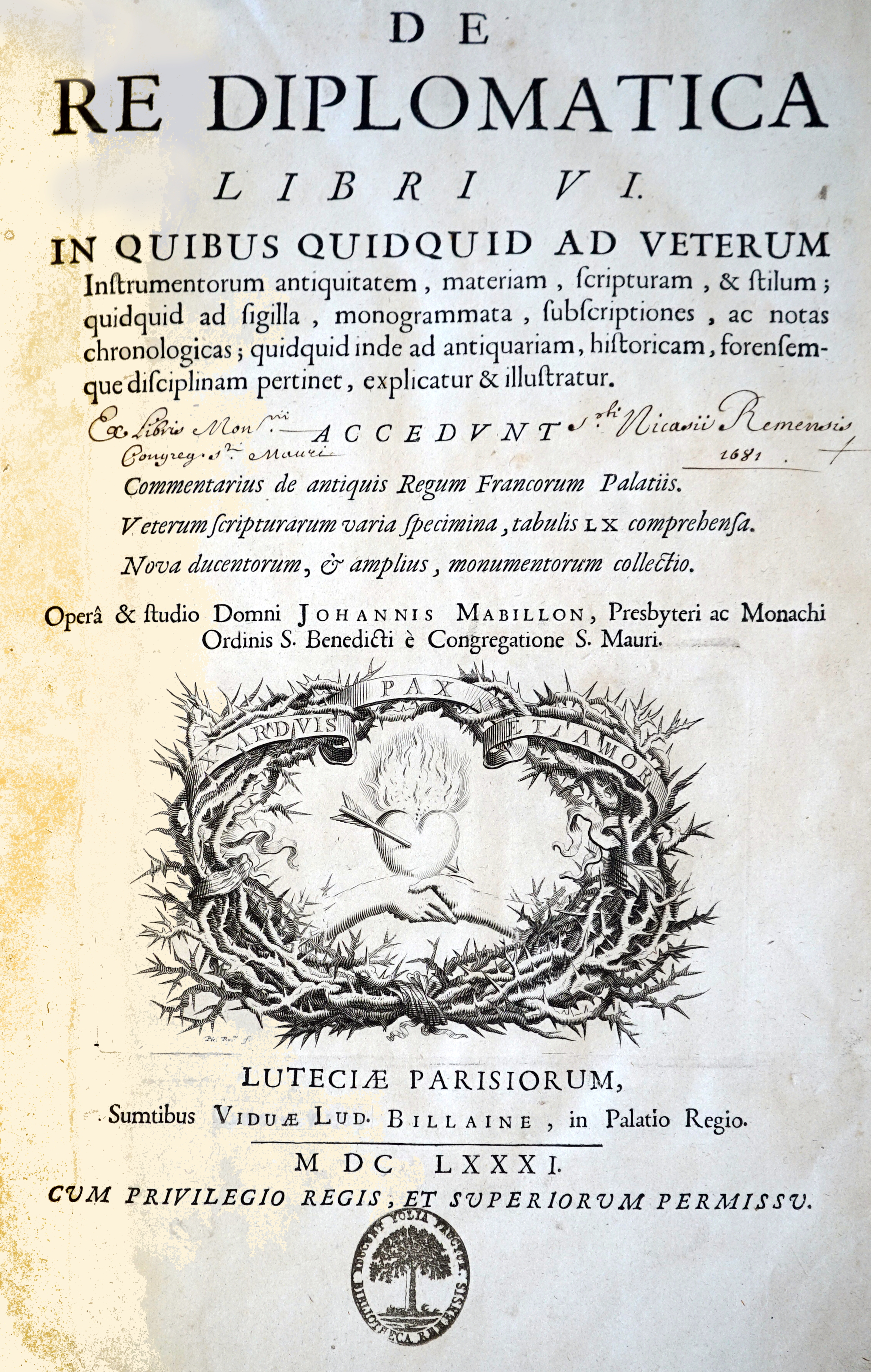 présentation du "de re diplomatica..." issu de la bibliothèque de l'abbaye st-Nicaise de Reims.